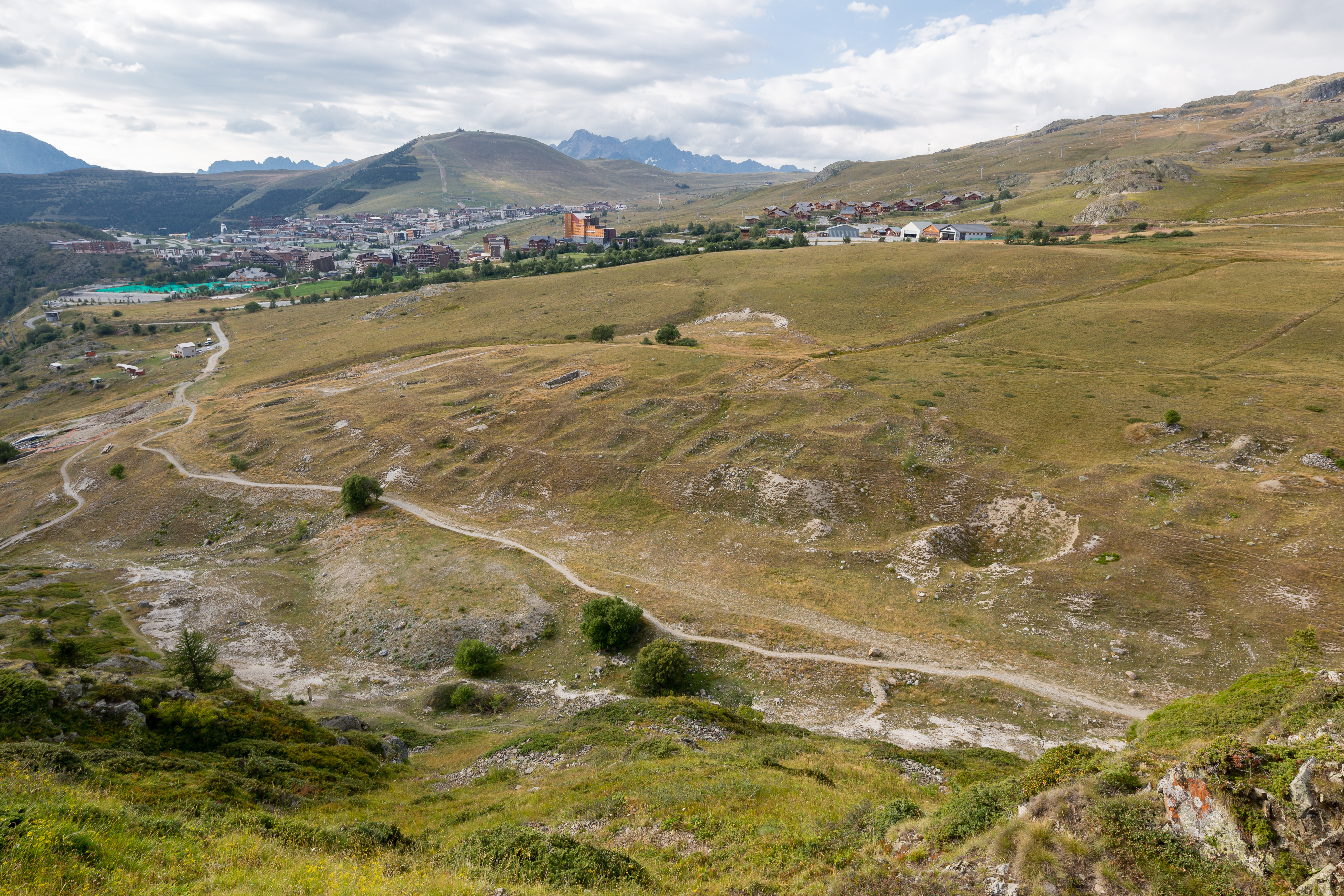 Site minier des Brandes à Huez (France).